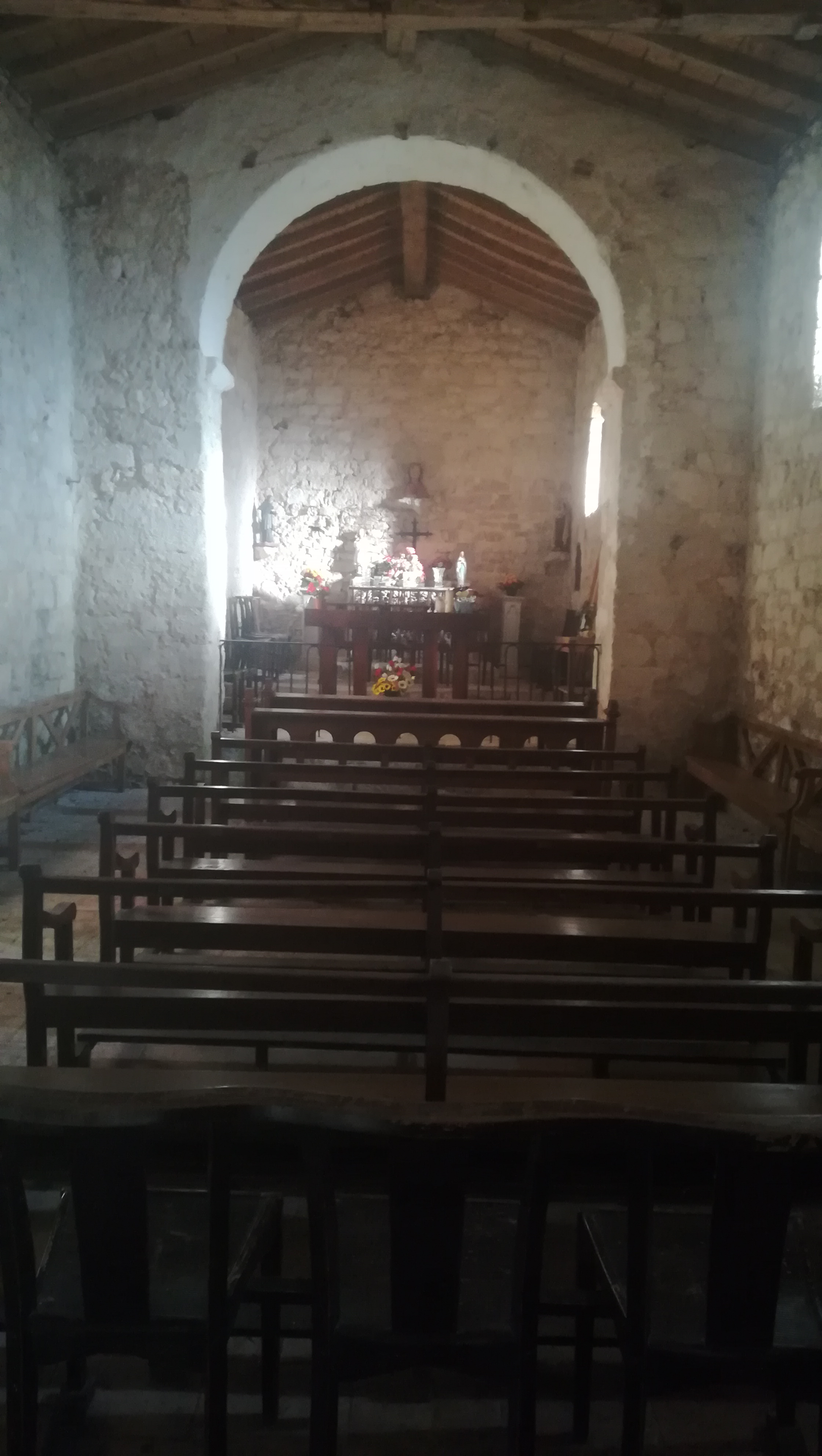 La Chapelle de Sanguinou, sur le Causse (Caucalières, Tarn)